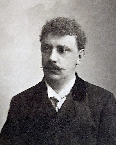 Václav Luňáček, český malíř, ilustrátor, mykolog a spisovatel